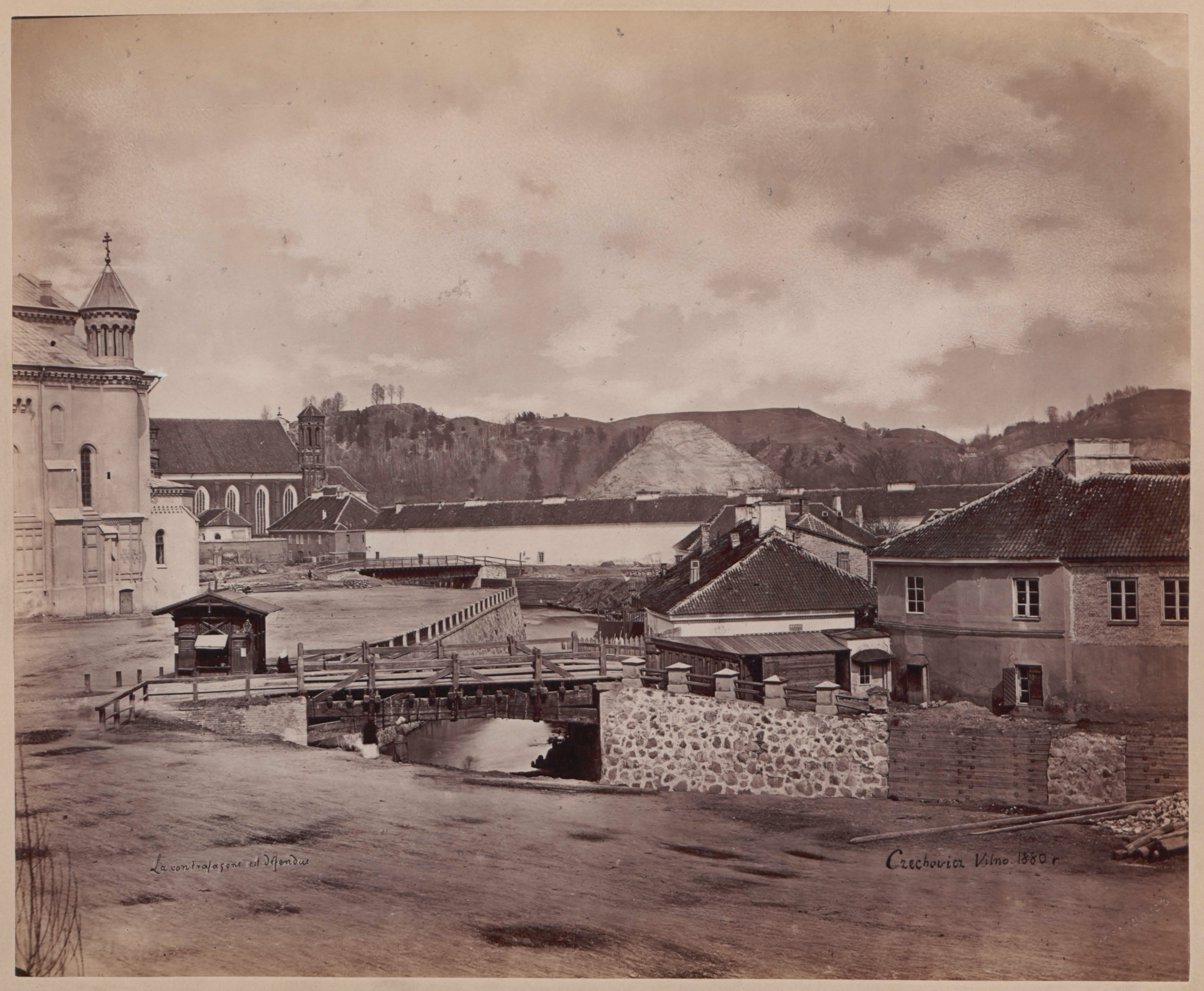 Беларуская (тарашкевіца): Вільня (Vilnia), Зарачанскі мост